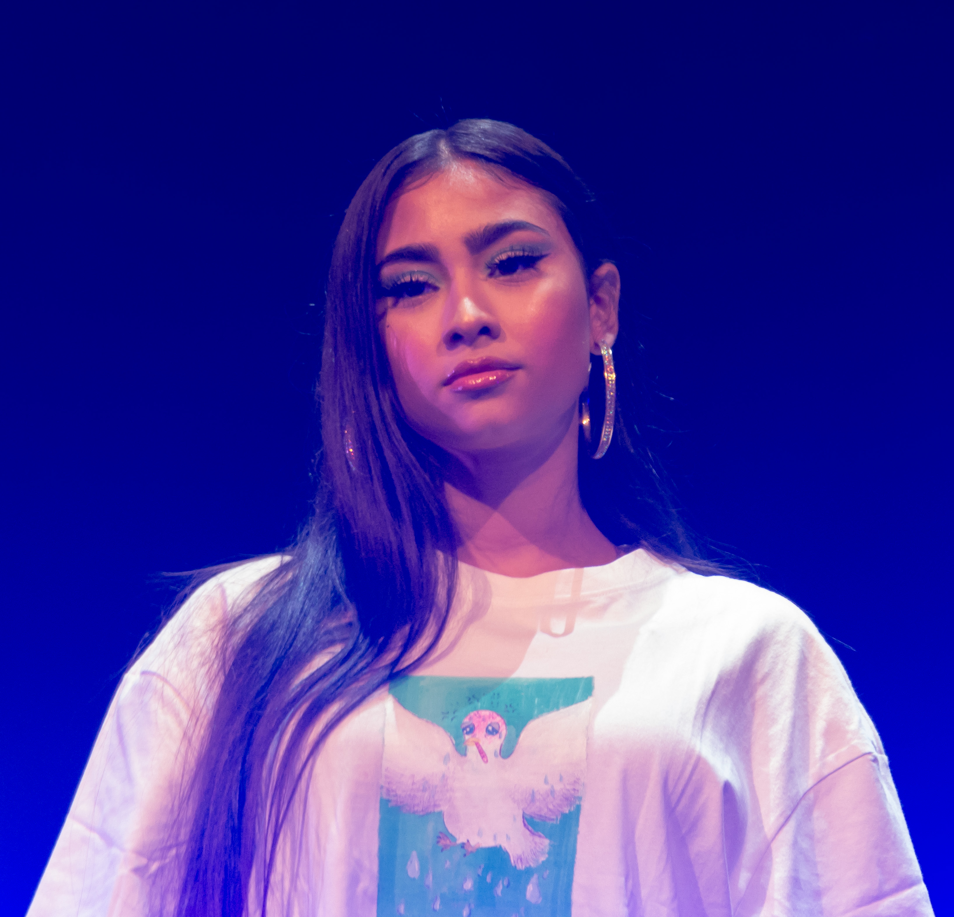 Pichilemu Surfestival 2020, Camping Laguna El Perro, Pichilemu, Región de O'Higgins, Chile